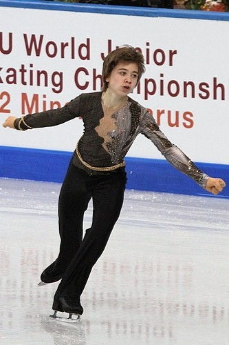 Даниэль Альберт Науриц (Эстония) на чемпионате мира по фигурному катанию среди юниров 2012